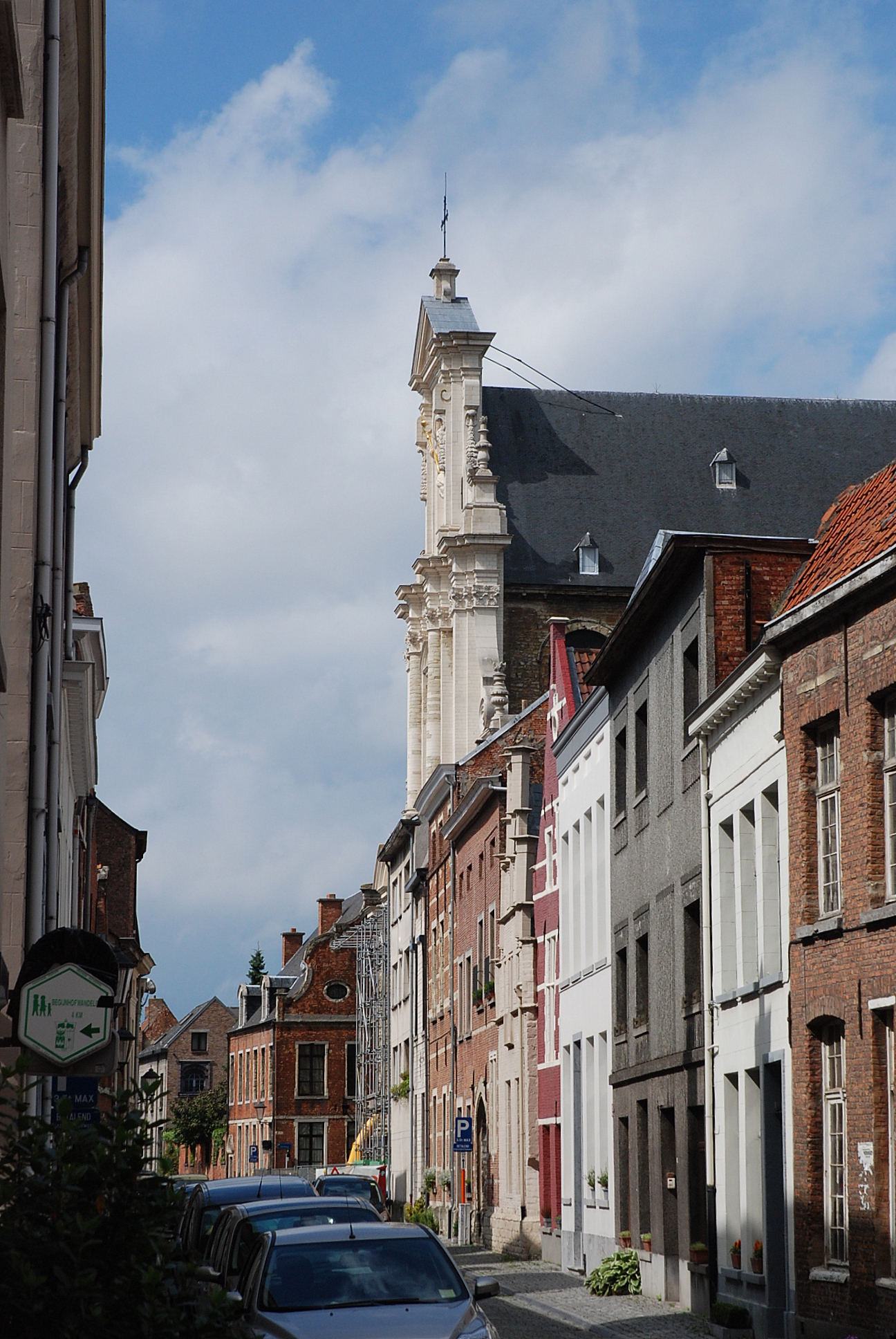 De Begijnhofkerk te Mechelen